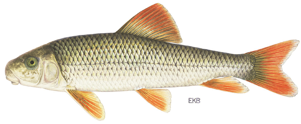 Greater Redhorse (Moxostoma valenciennesi)